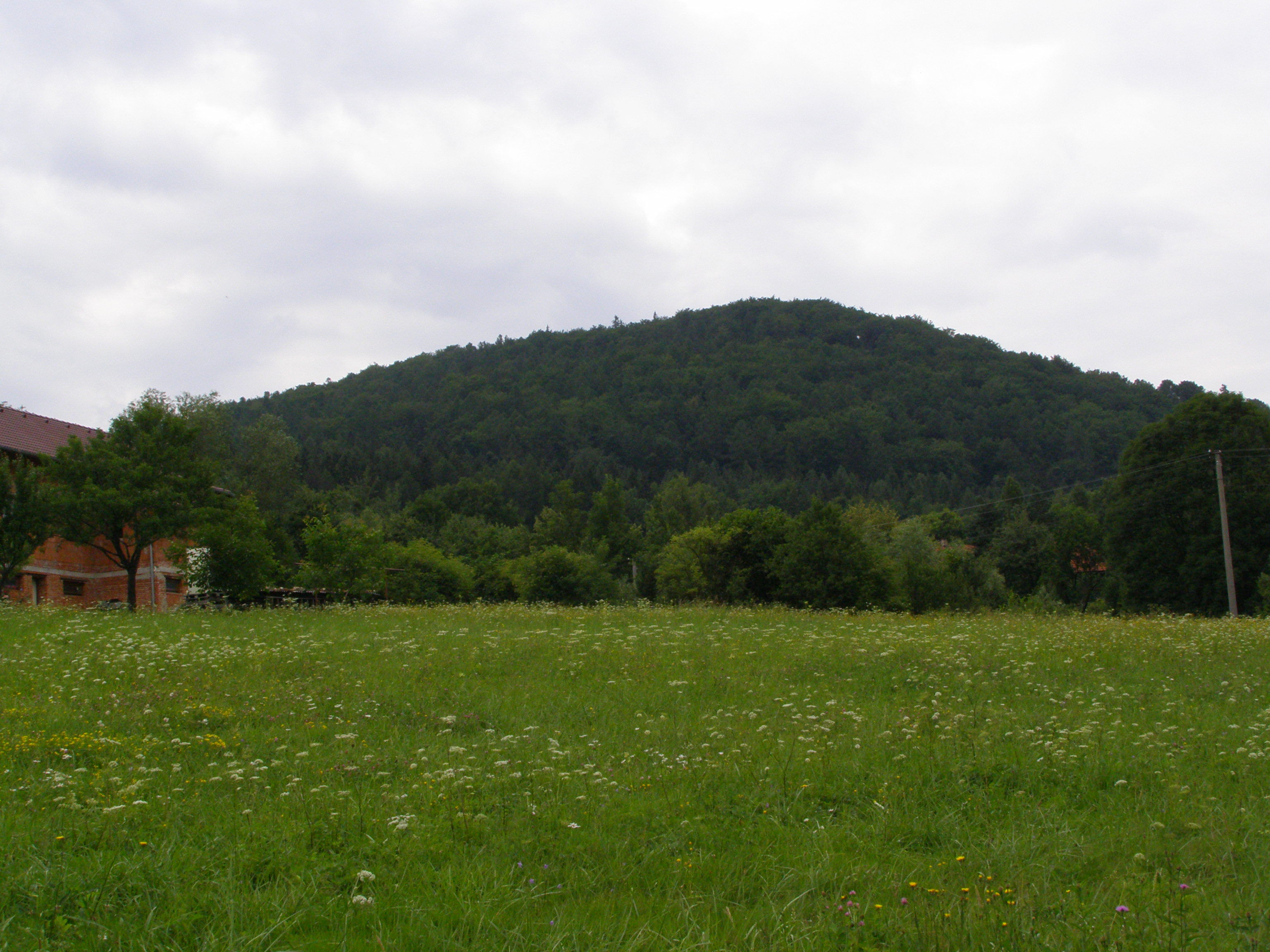 Palkovické hůrky, Kazničov (601 m)